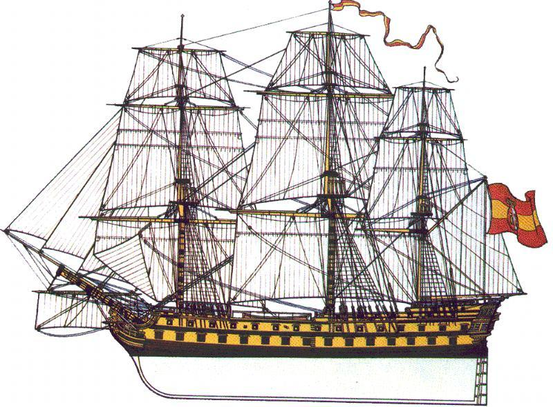 Navío de línea de la Armada Española Bahama, pintado por Rafael Berenguer (1822-1890), Museo naval de Madrid